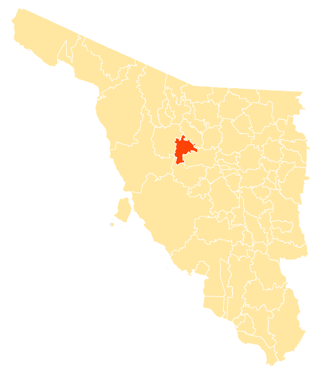 Municipio en Sonora, México.